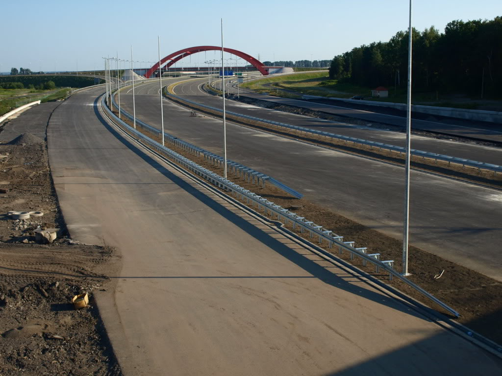 Der Bau der polnischen Autobahn A1 auf dem Abschnitt Gliwice-Maciejów in Richtung Maciejów im Juli 2011.